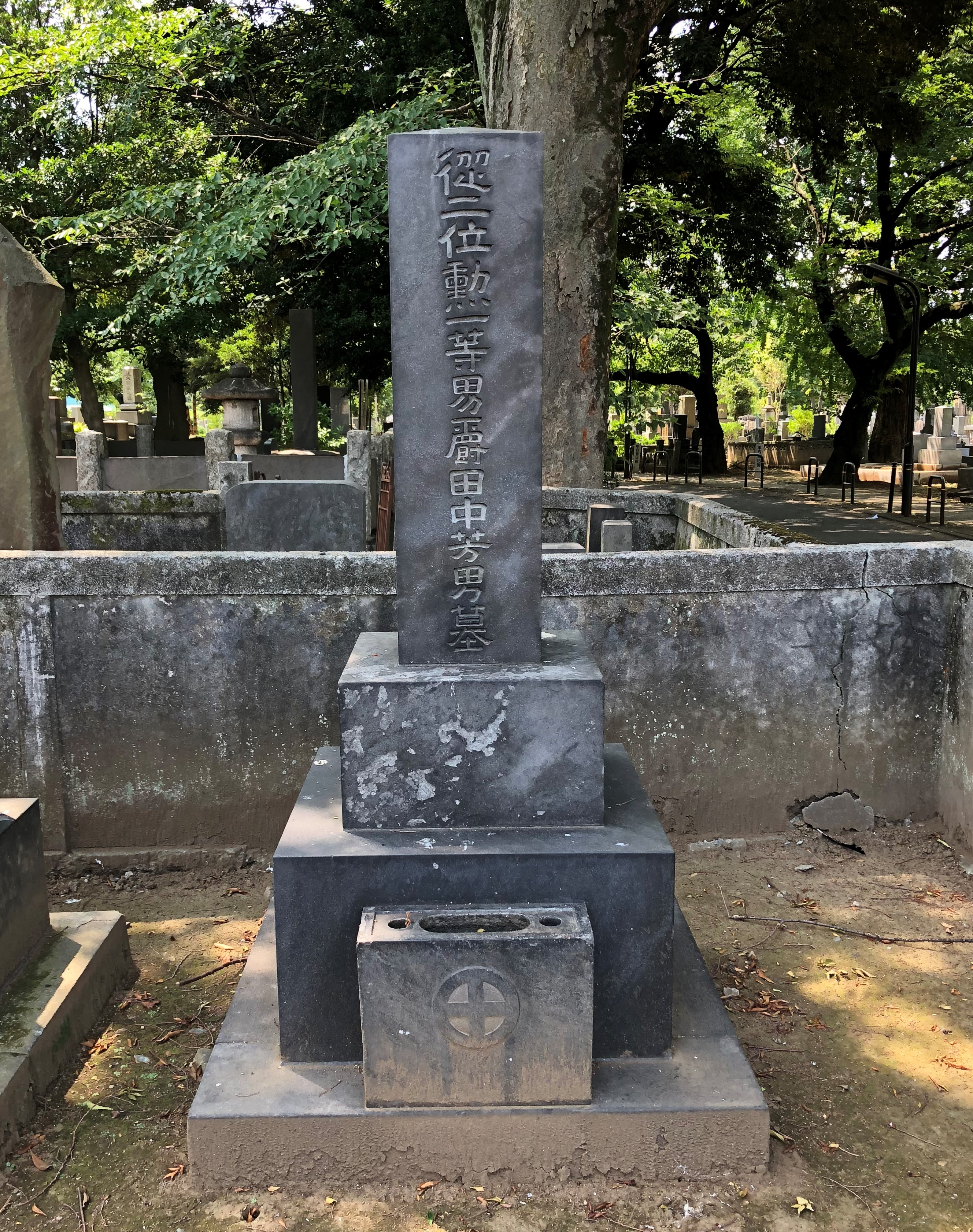 所在は東京都谷中霊園の乙8号10側。2019年8月18日撮影。